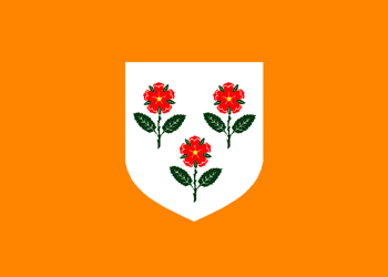 Bandera de Rose Island, micronació